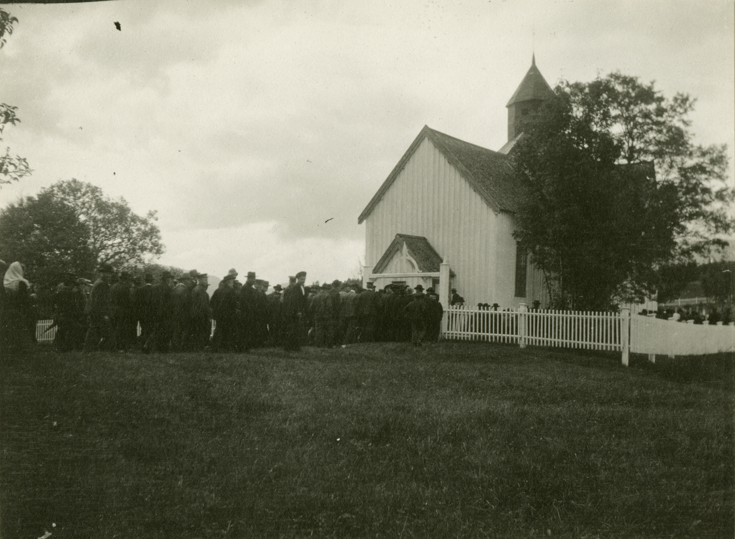 Vassås kirke i Bindal, Nordland